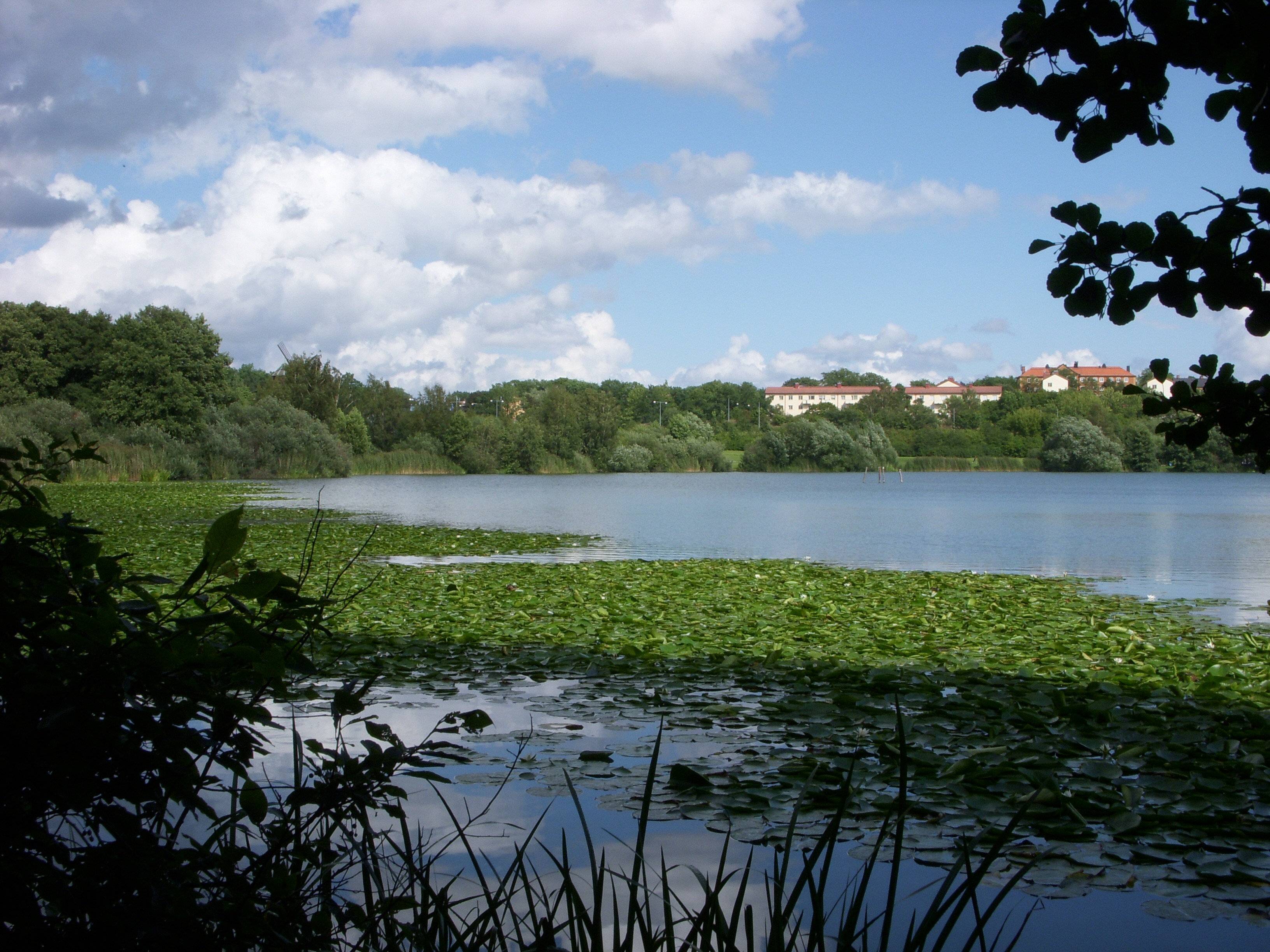 Lillsjön i Bromma, Stockholm